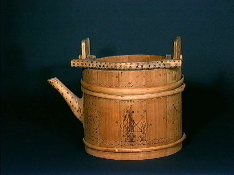 Ølbøtte med svidekor fra Skaun i Sør-Trøndelag. Bøtta er lagget og laget av furu. Diameter 30 cm. Foto Anne-Lise Reinsfelt, Norsk Folkemuseum. NF.1927-0448.